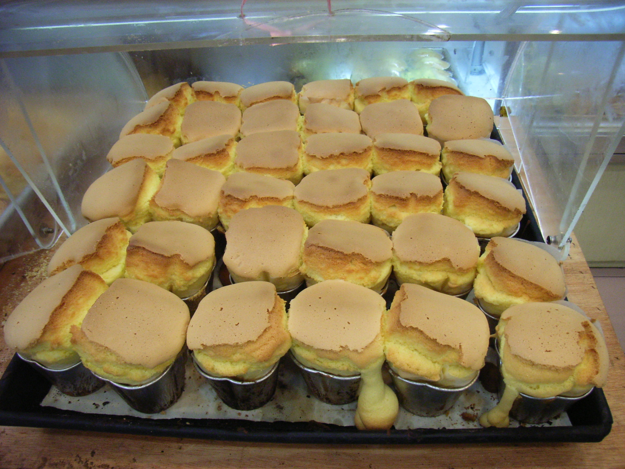 HK bakery Egg Cake 旦糕仔 Photo taking in Sai Ying Poon, Hong Kong 中原地圖 HK map engine